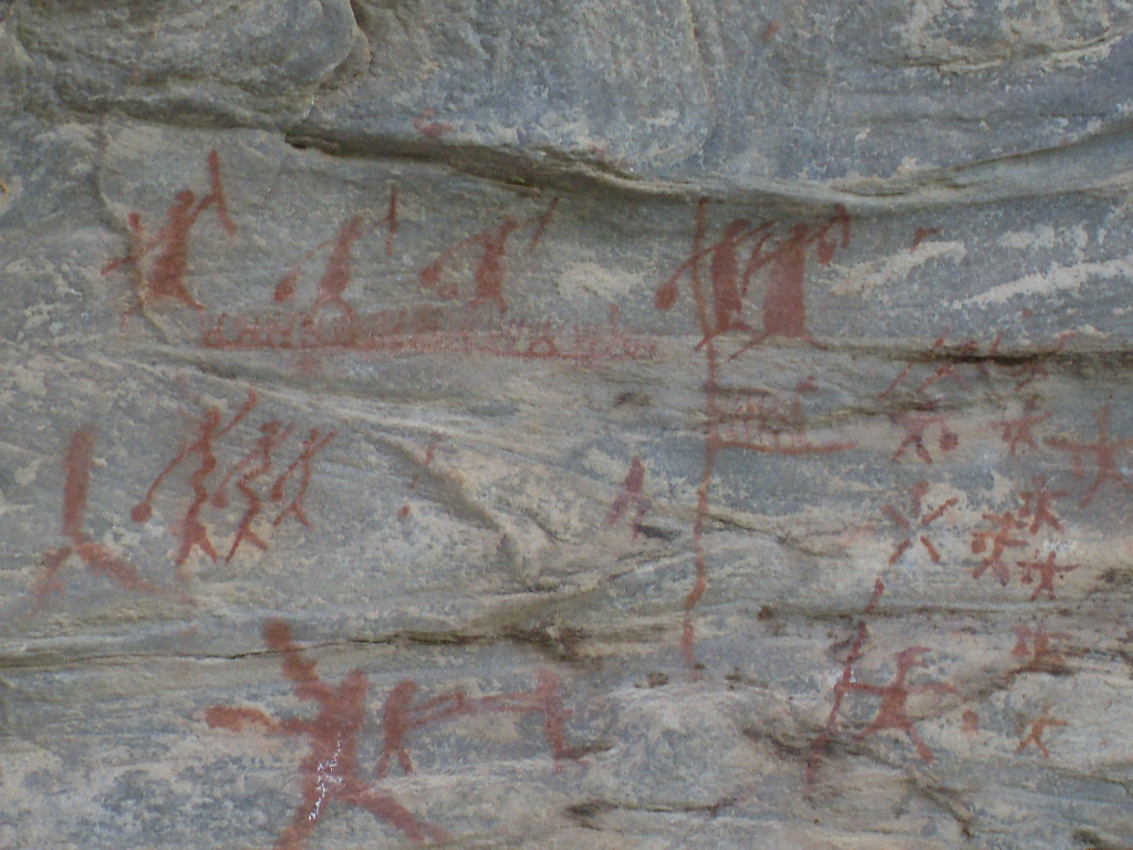 Sítio Arquelógico do Xique Xique localizado no município de Carnaúba dos Dantas.